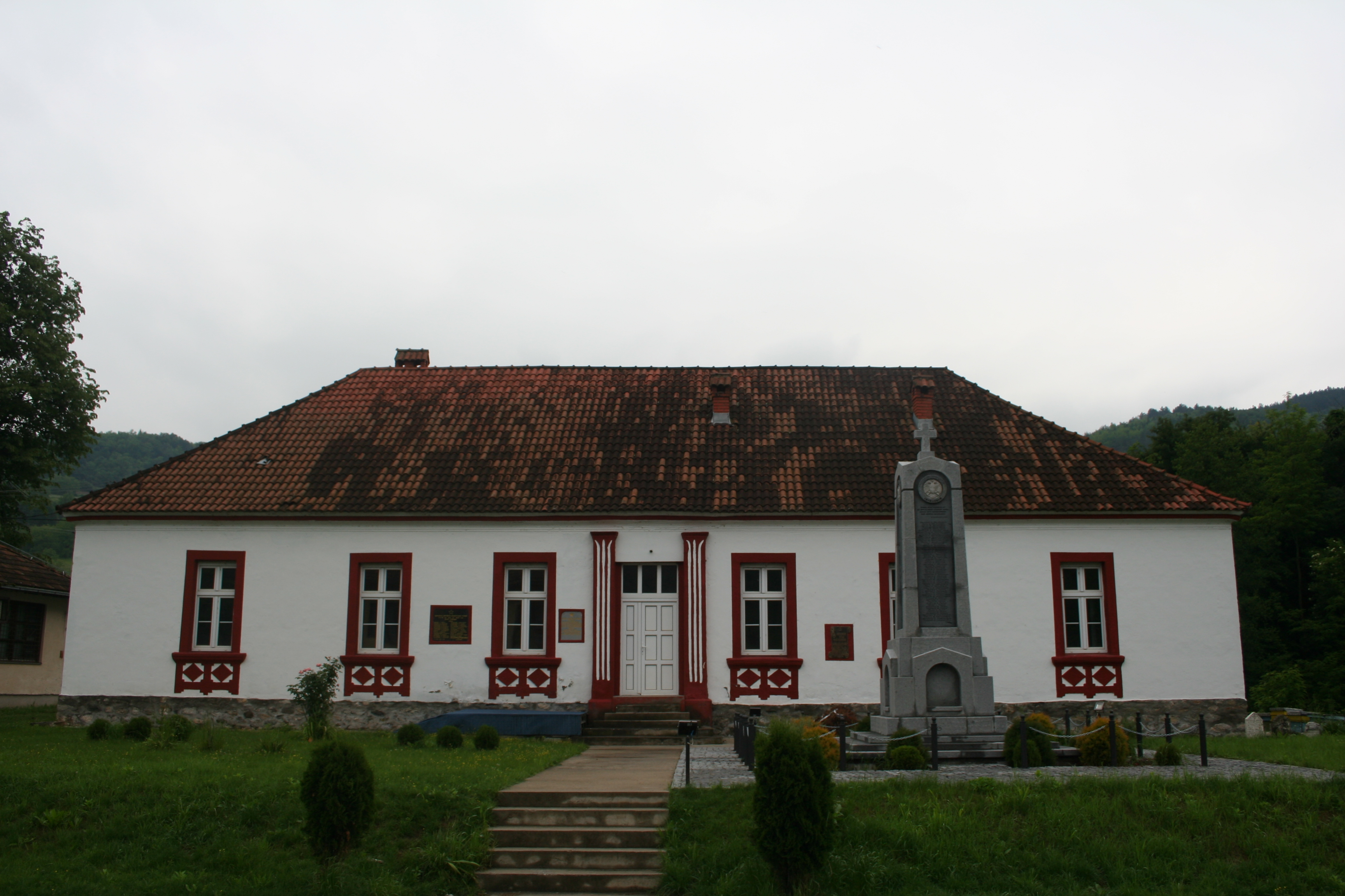 Stara škola u Bačevcima